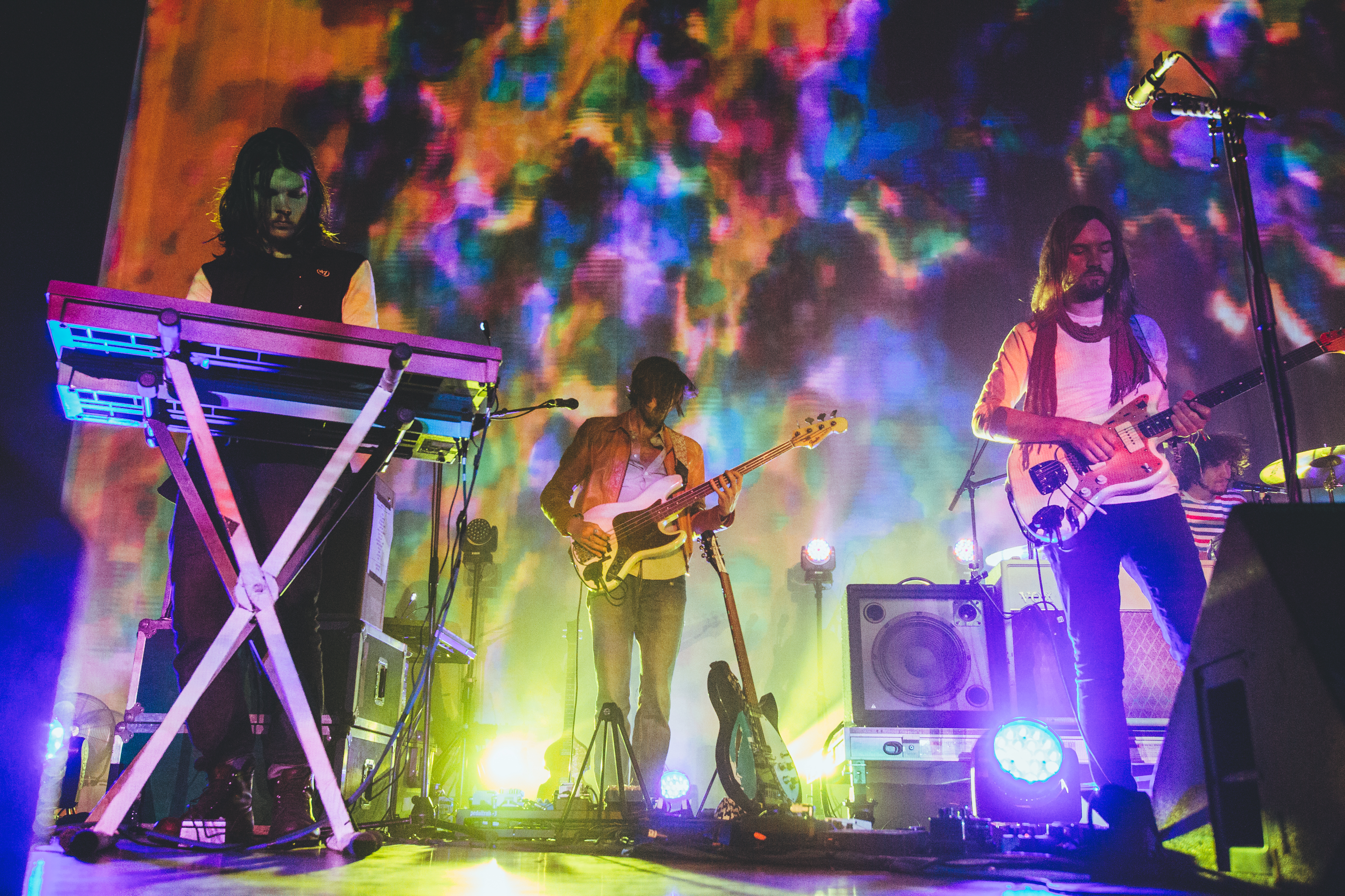 Tame_Impala-3760